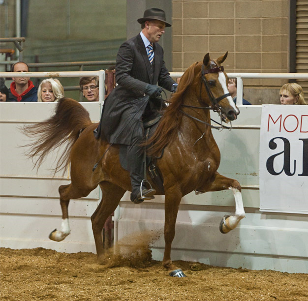 Beautiful mare